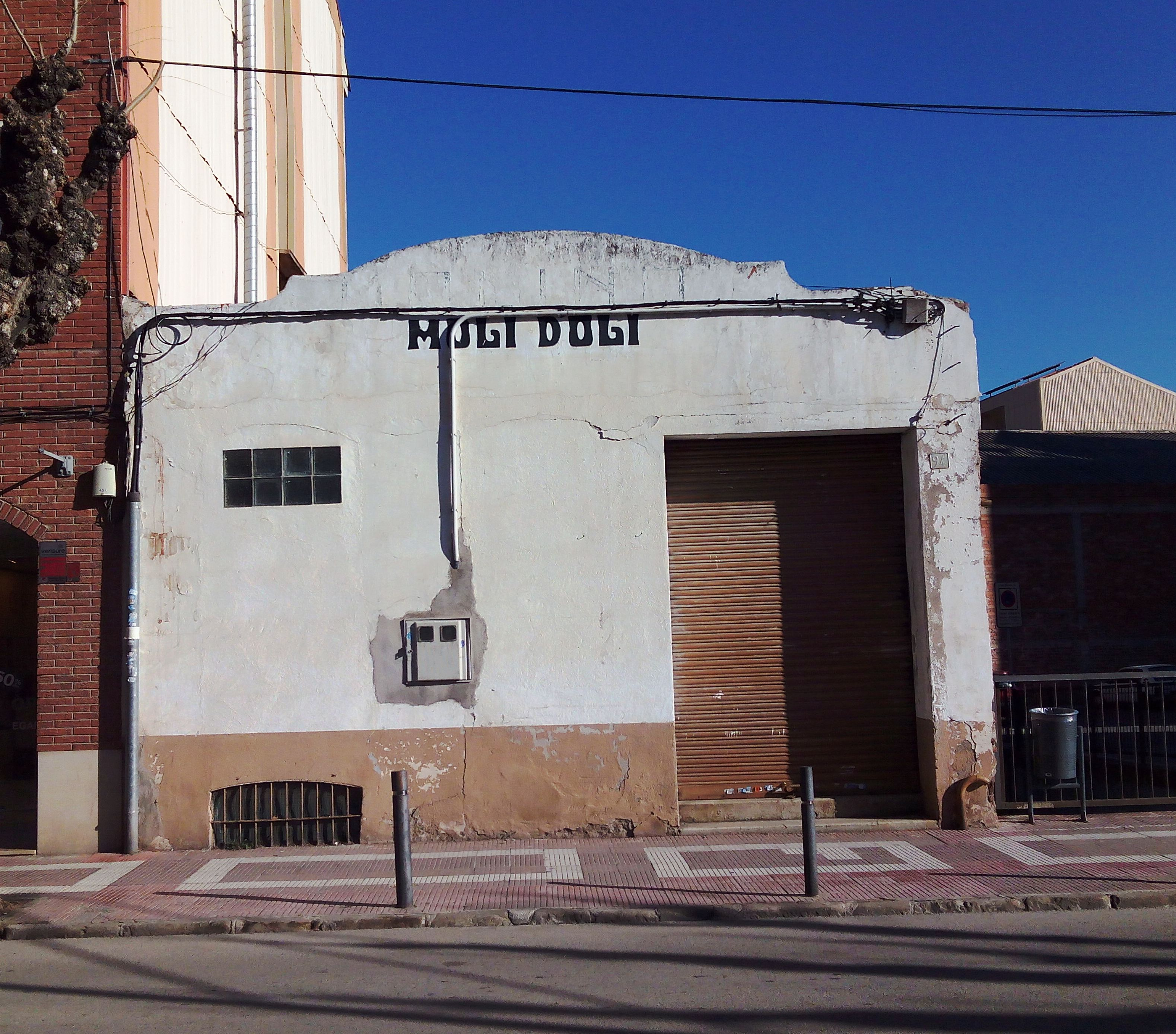 Moli d'oli d'Olesa de Montserrat